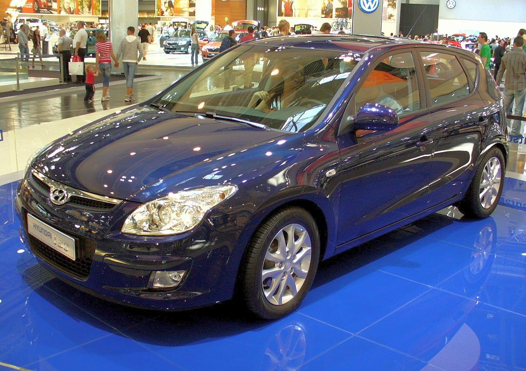 Hyundai i30